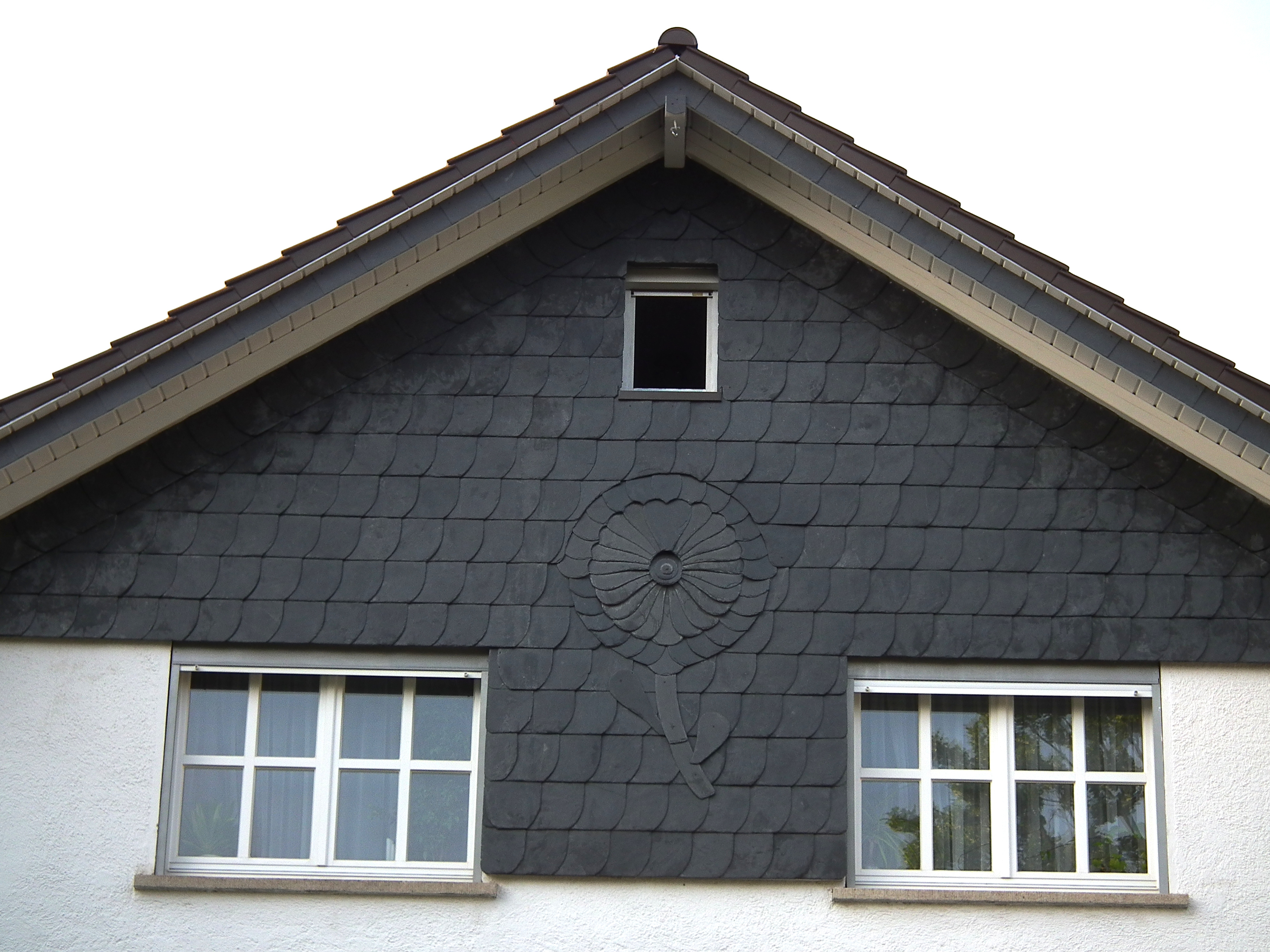 Wohnhaus in Nußloch, gedeckt mit Schiefer (Baden-Württemberg, Deutschland)